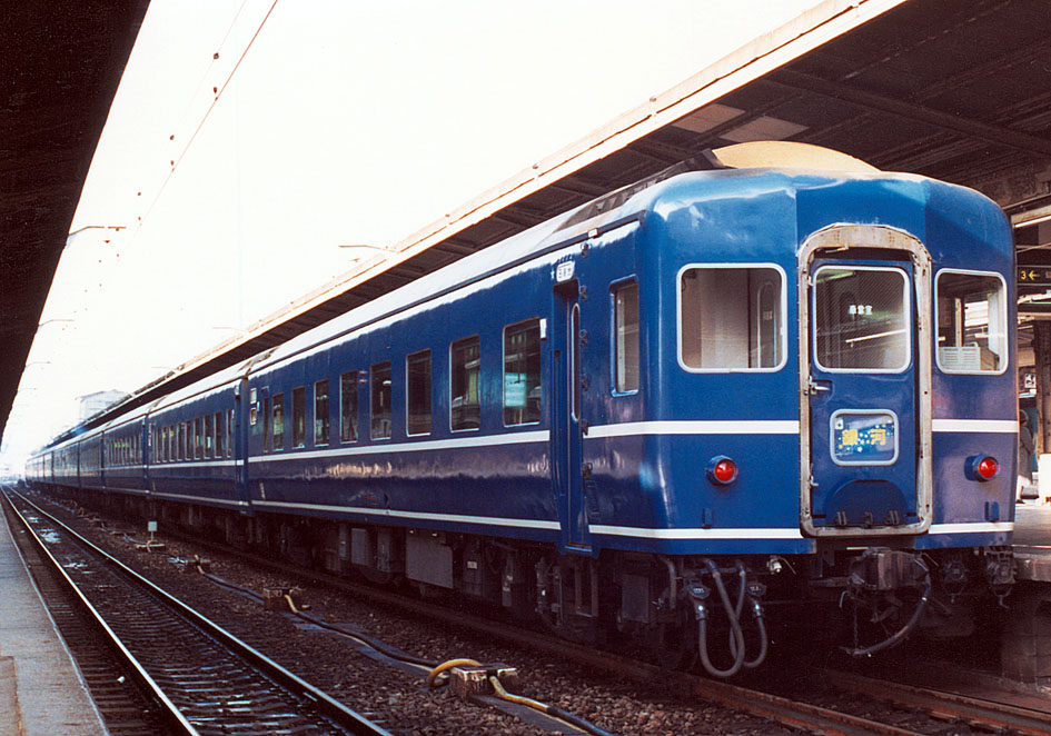 国鉄14系客車 スハネフ14 急行「銀河」